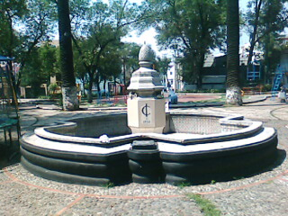 Fuente en el parque Maria del Carmen en la Colonia Industrial